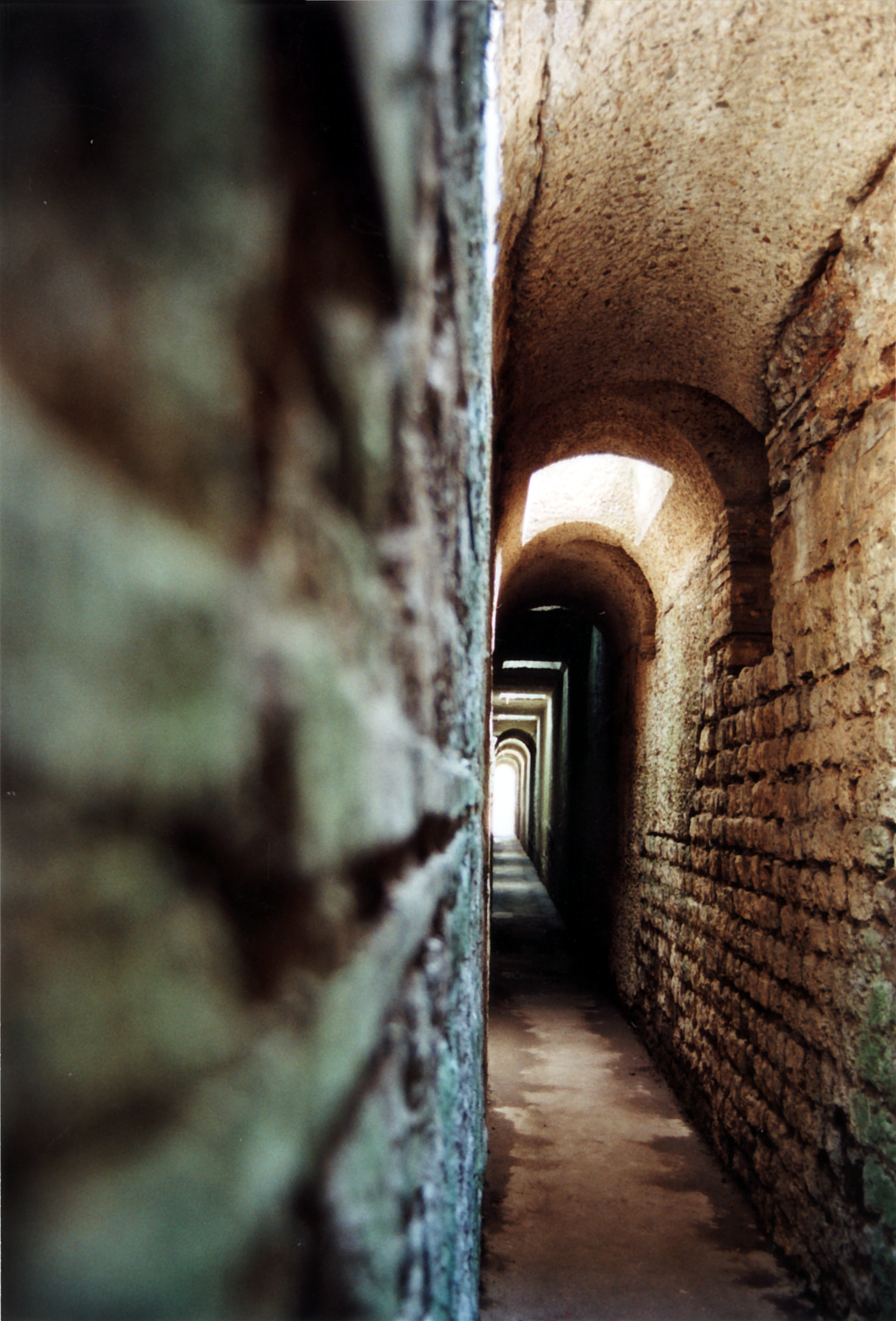 Trier, Kaiserthermen, Heizungszugang